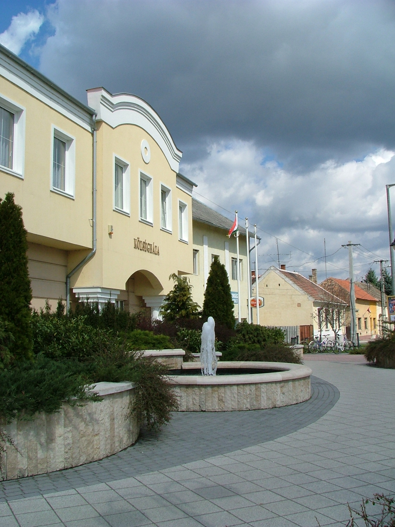 Nagyigmándi községháza